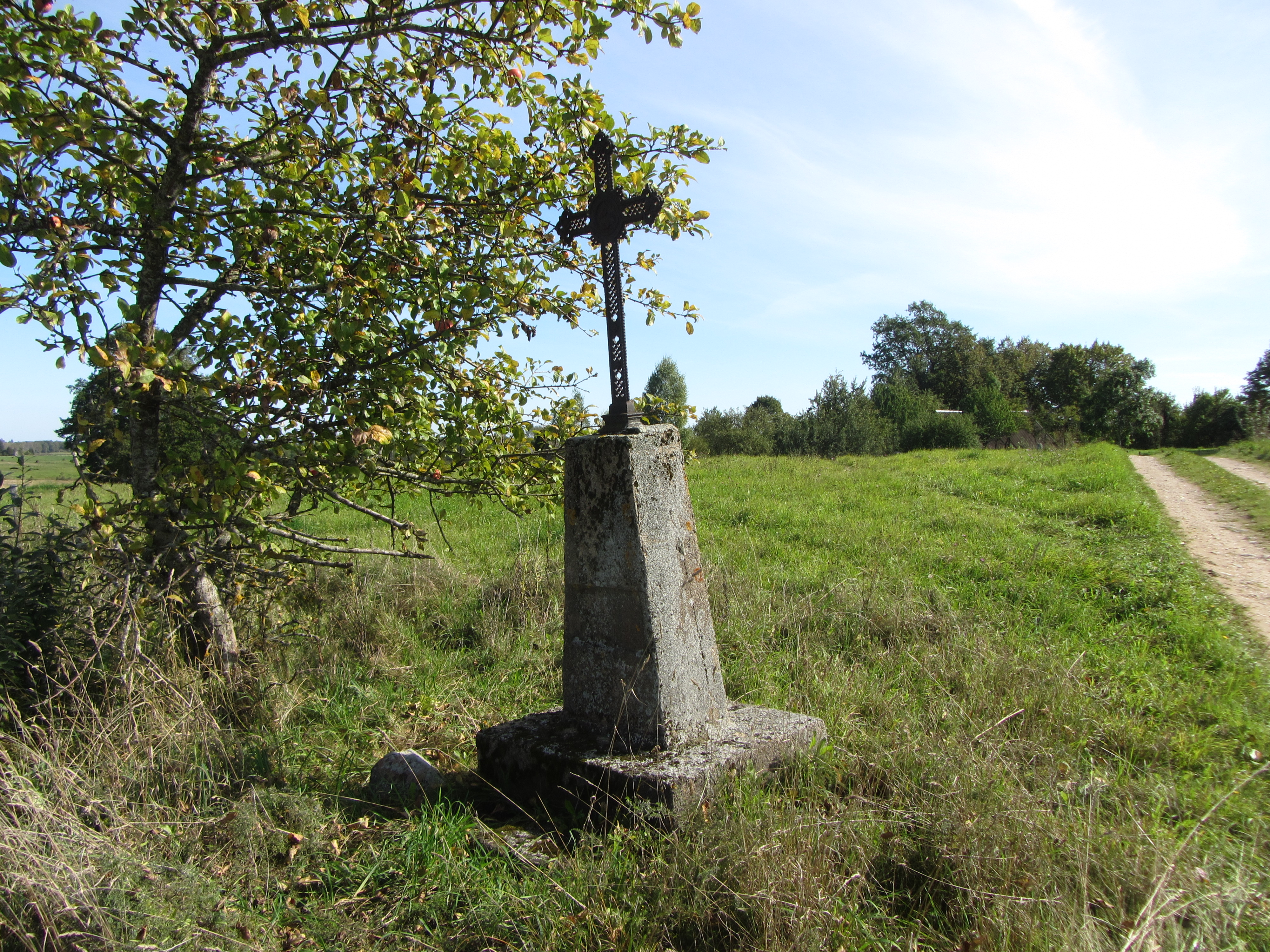 Naujojo Daugėliškio sen., Lithuania